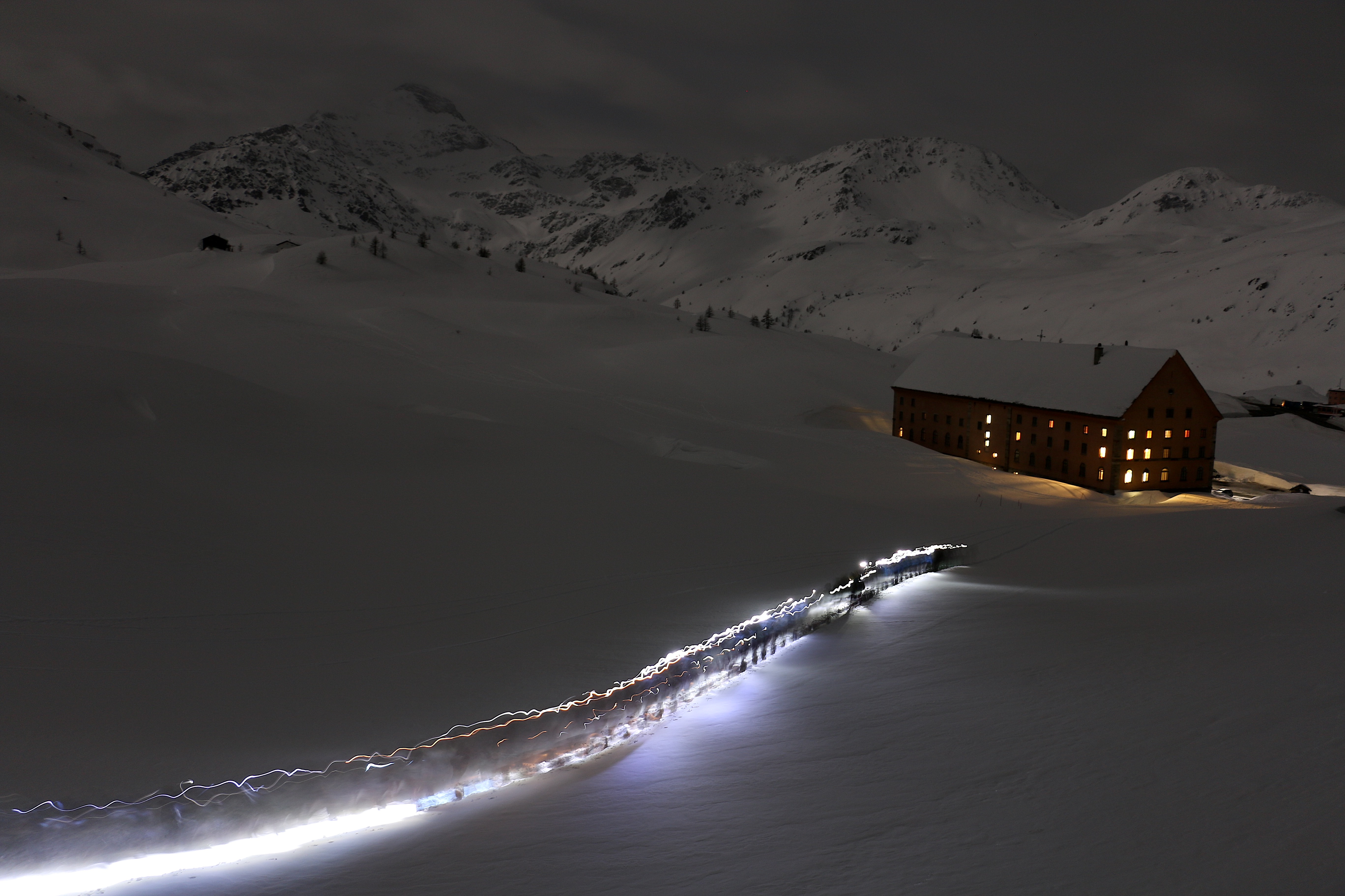 Nachtwanderung im Winter auf dem Simplonpass